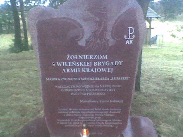 Pomnik żołnierzy wyklętych w Bartlu Wielkim